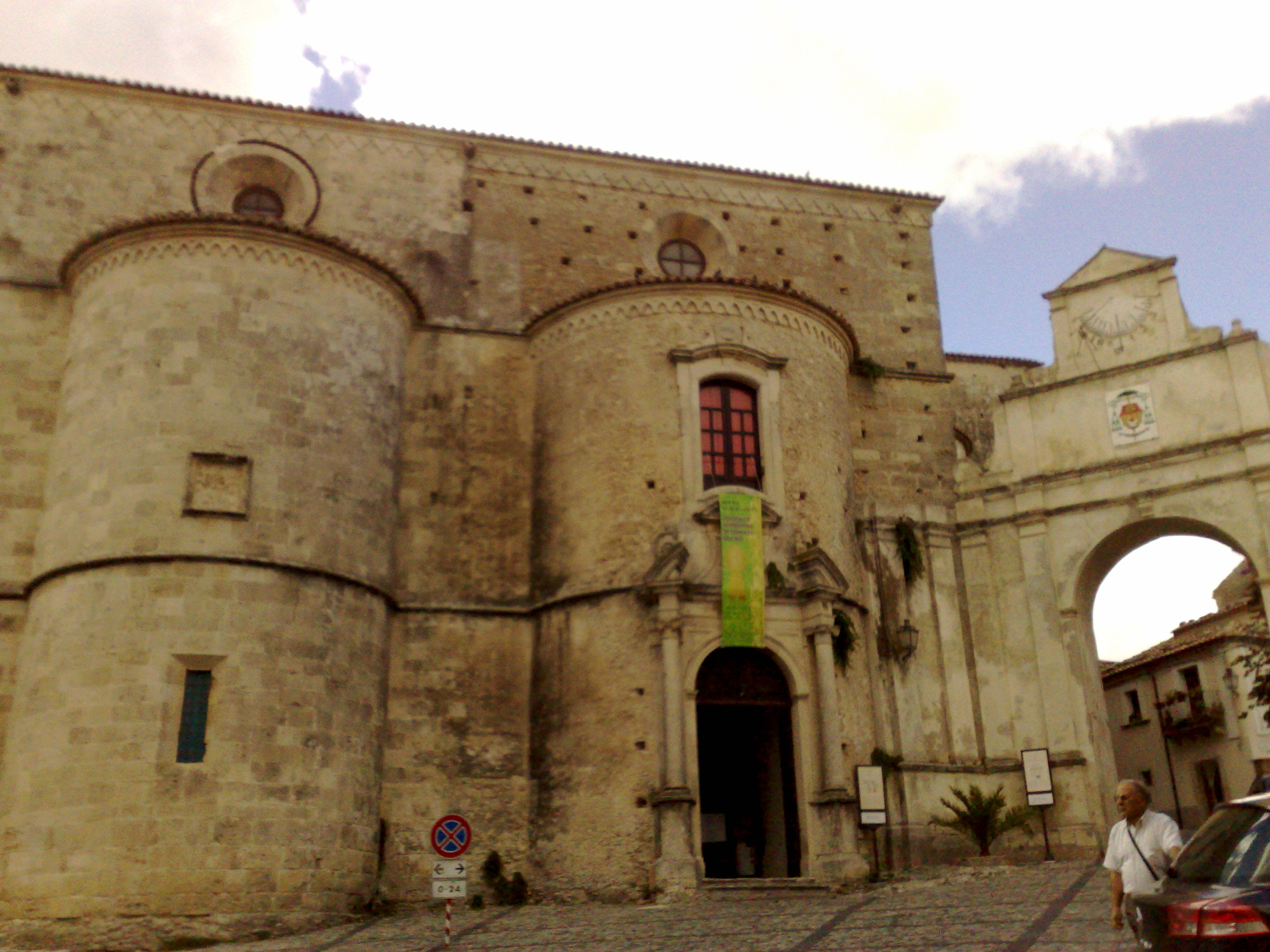 Cattedrale di Gerace - Esterno